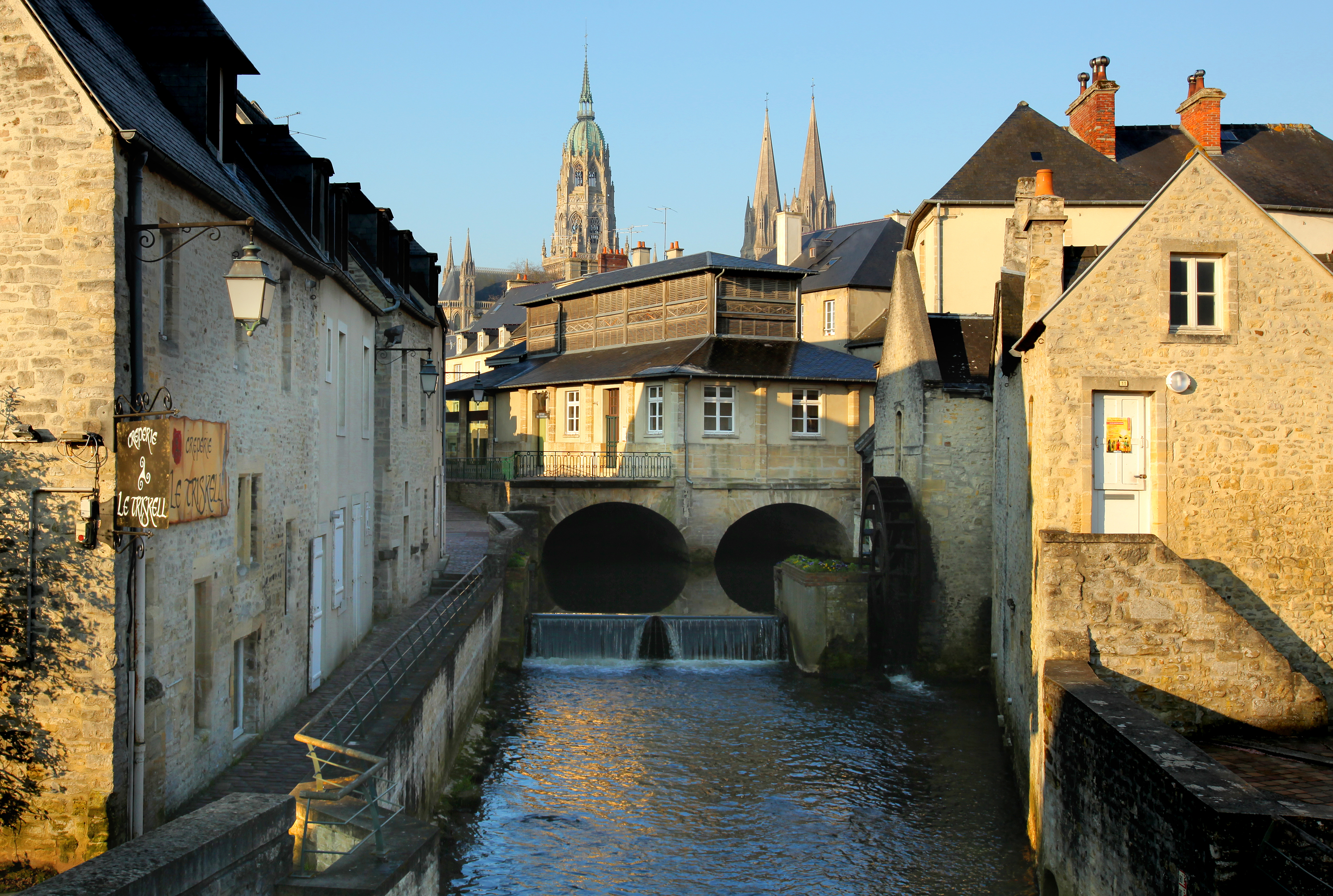 Rives de l'Aure